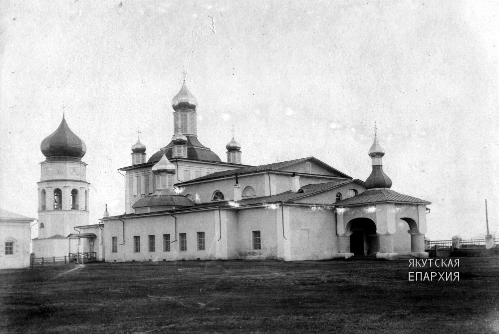 Троицкий кафедральный собор в Якутске